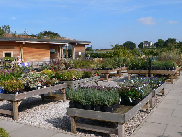 Garden centre at Ness Gardens